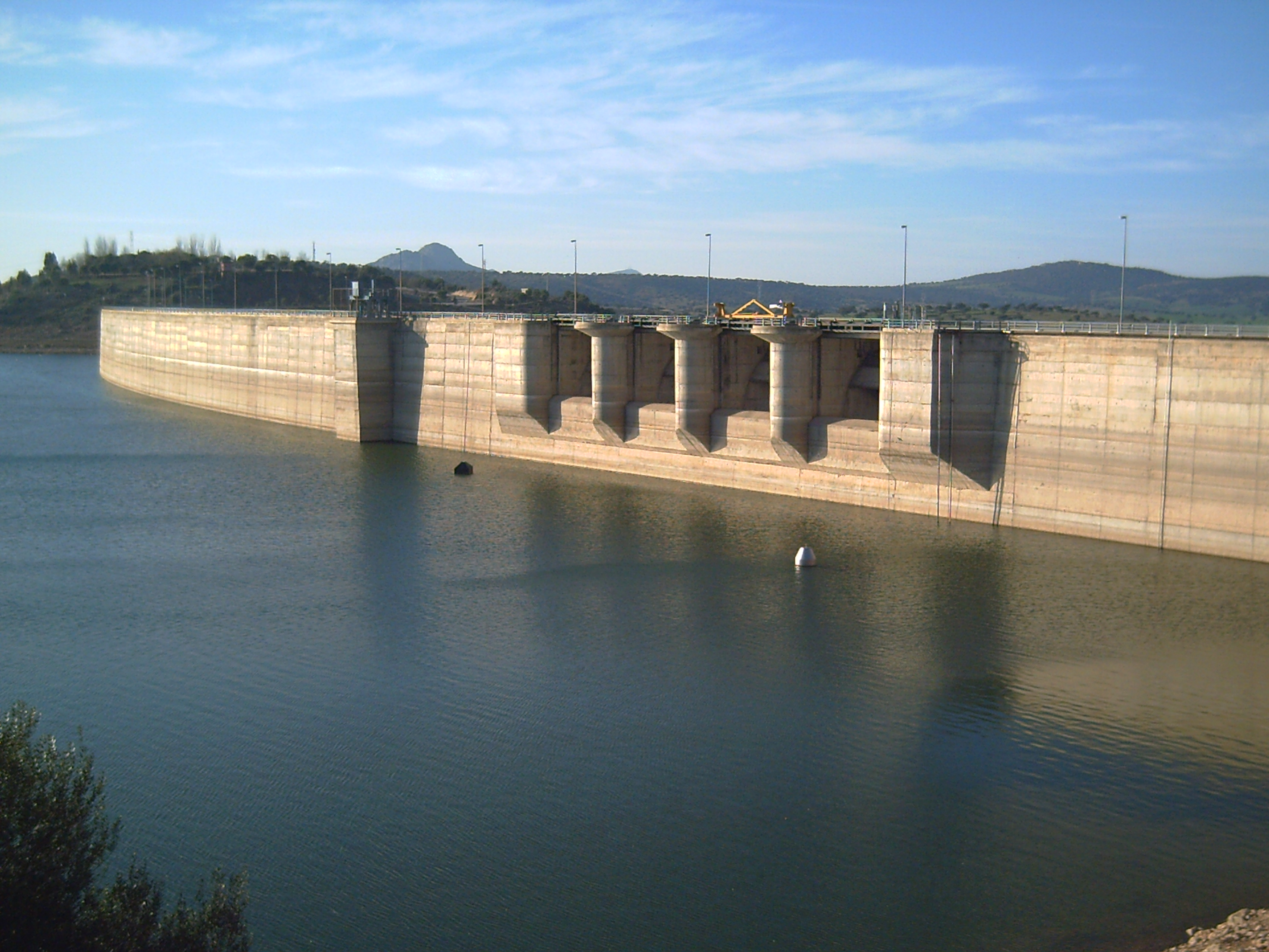 Presa asiahá ena localiá pacensi d'Alanhi